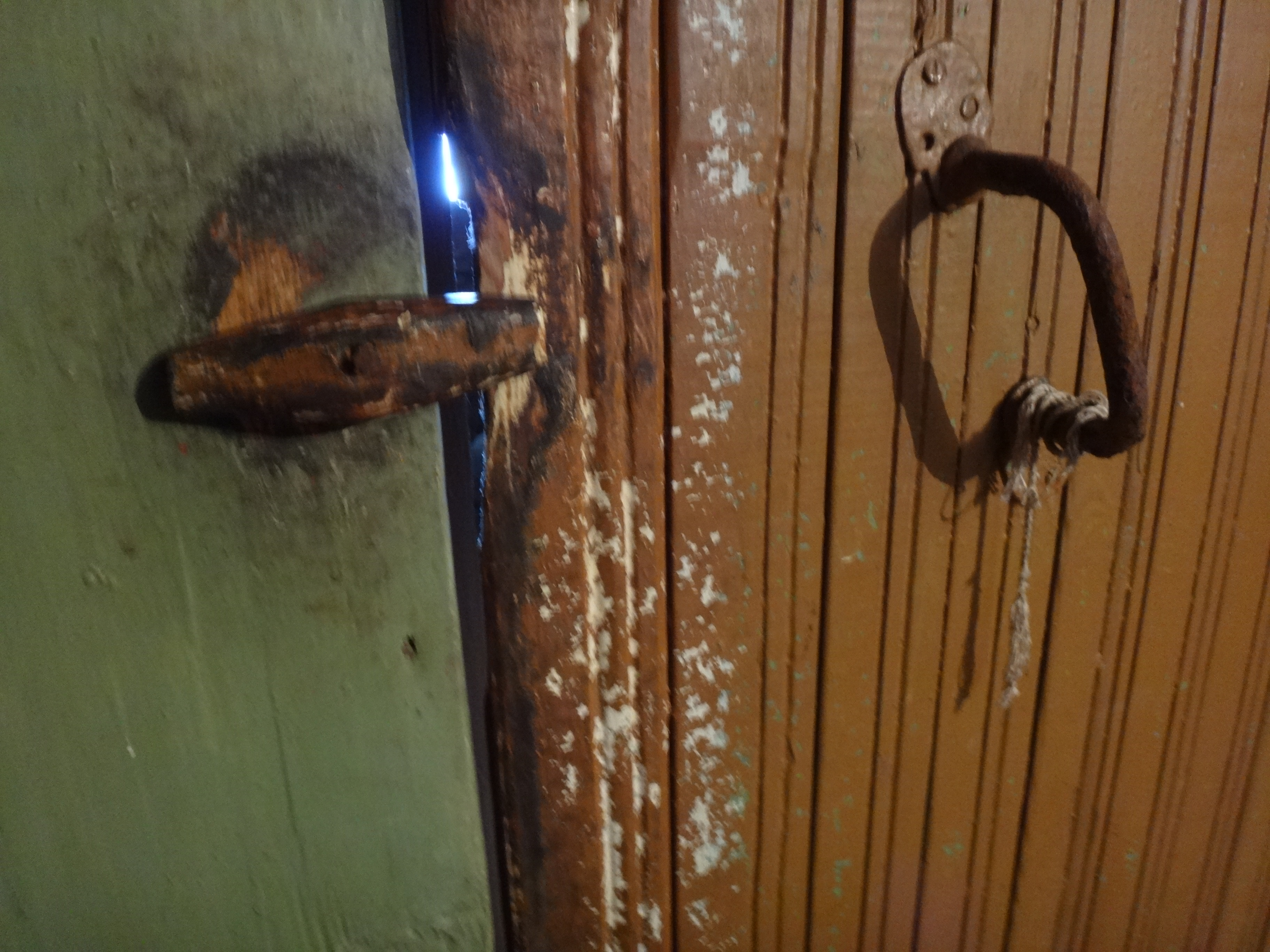 Замок-вертушка